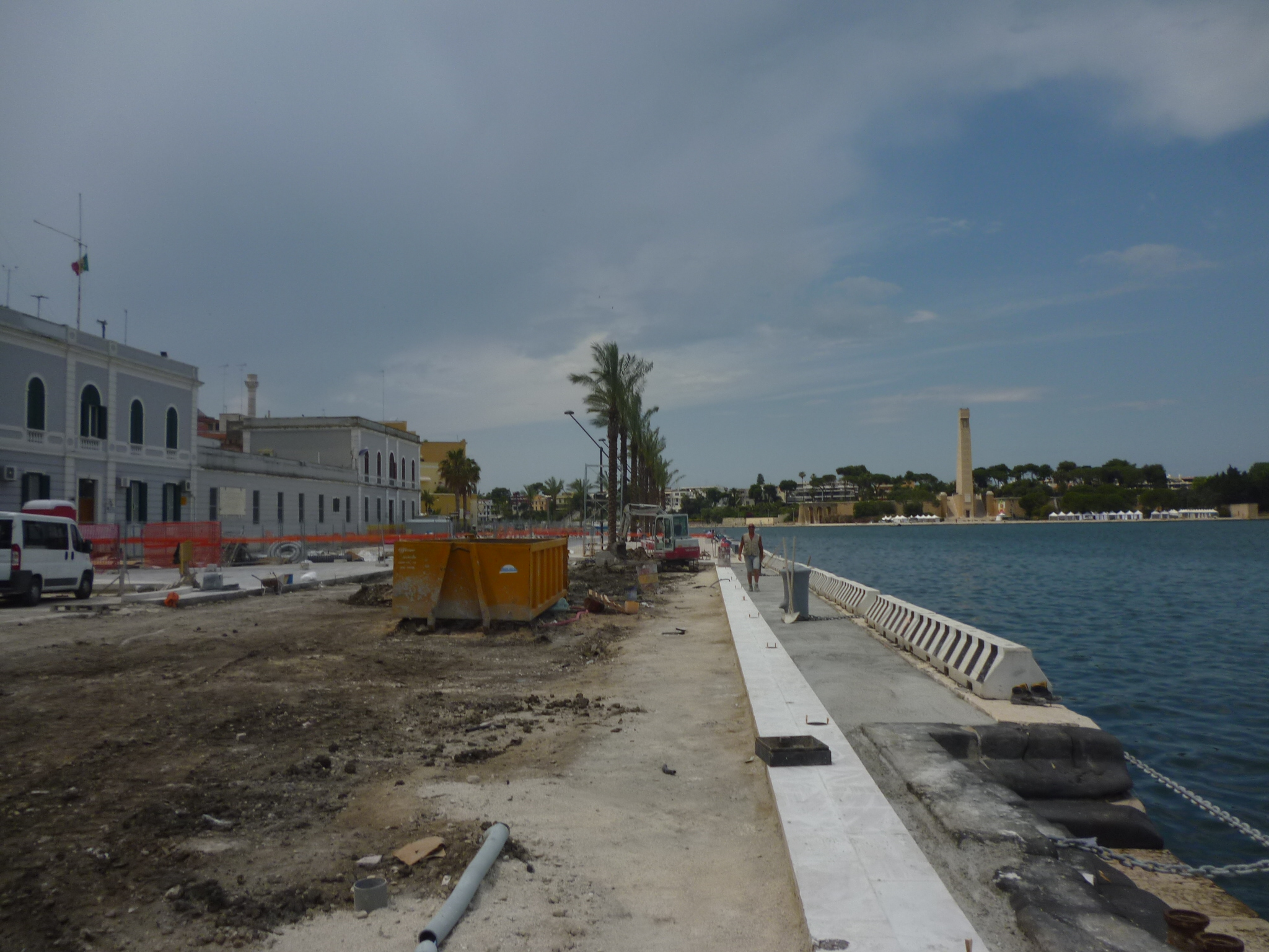 מראות העיר ברידיזי 2013